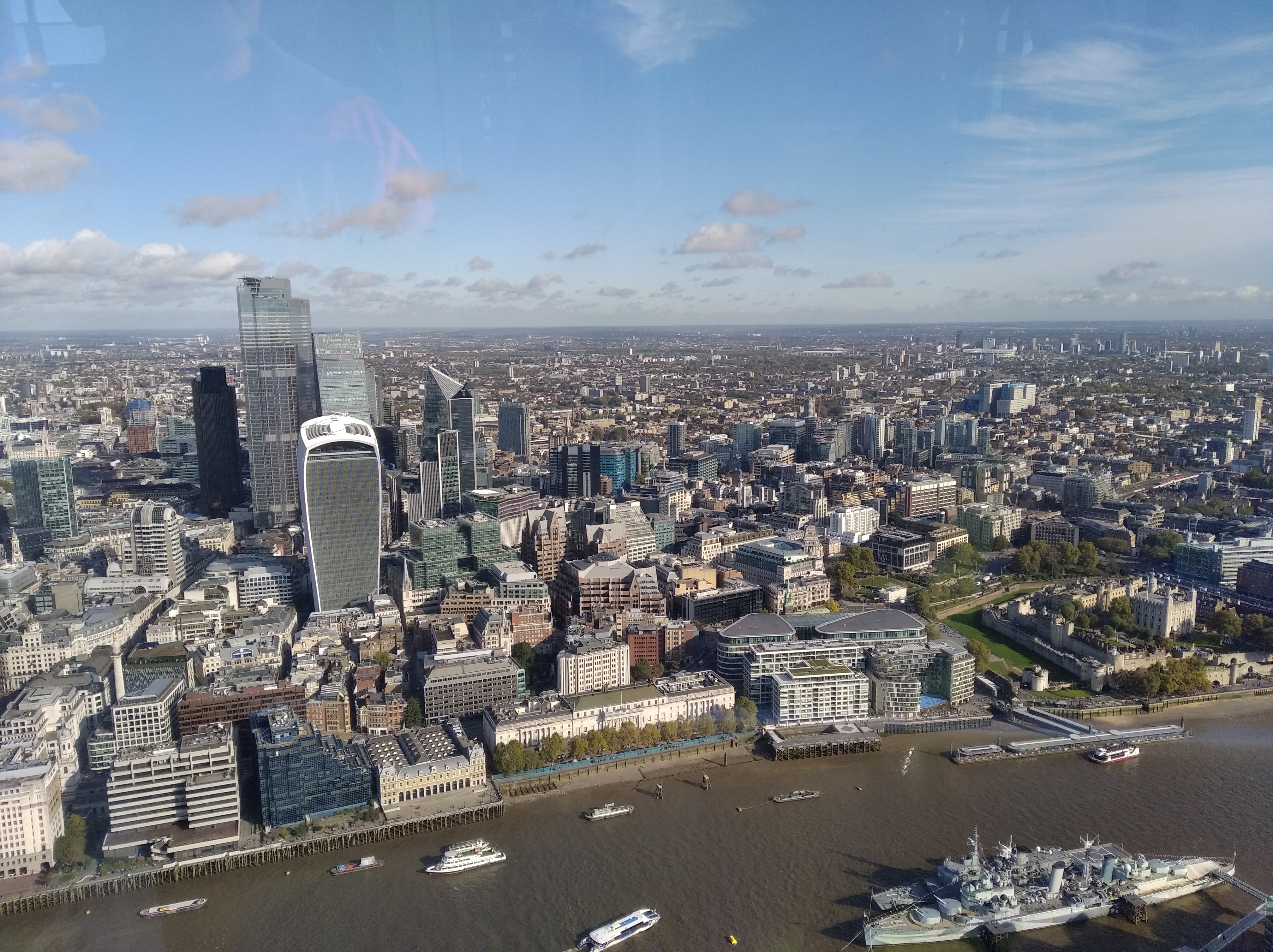 תמונה מהקומה ה-94 של מגדל השארד, לונדון. הצילום פונה אל נהר התמזה הסמוך וניתן לראות את הסיטי של לונדון, ואת התמזה.